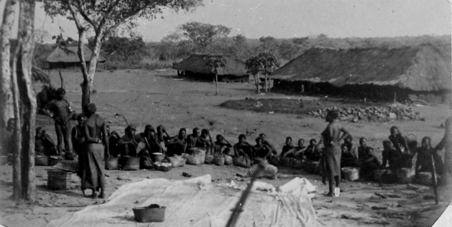 marché Fort-Crampel